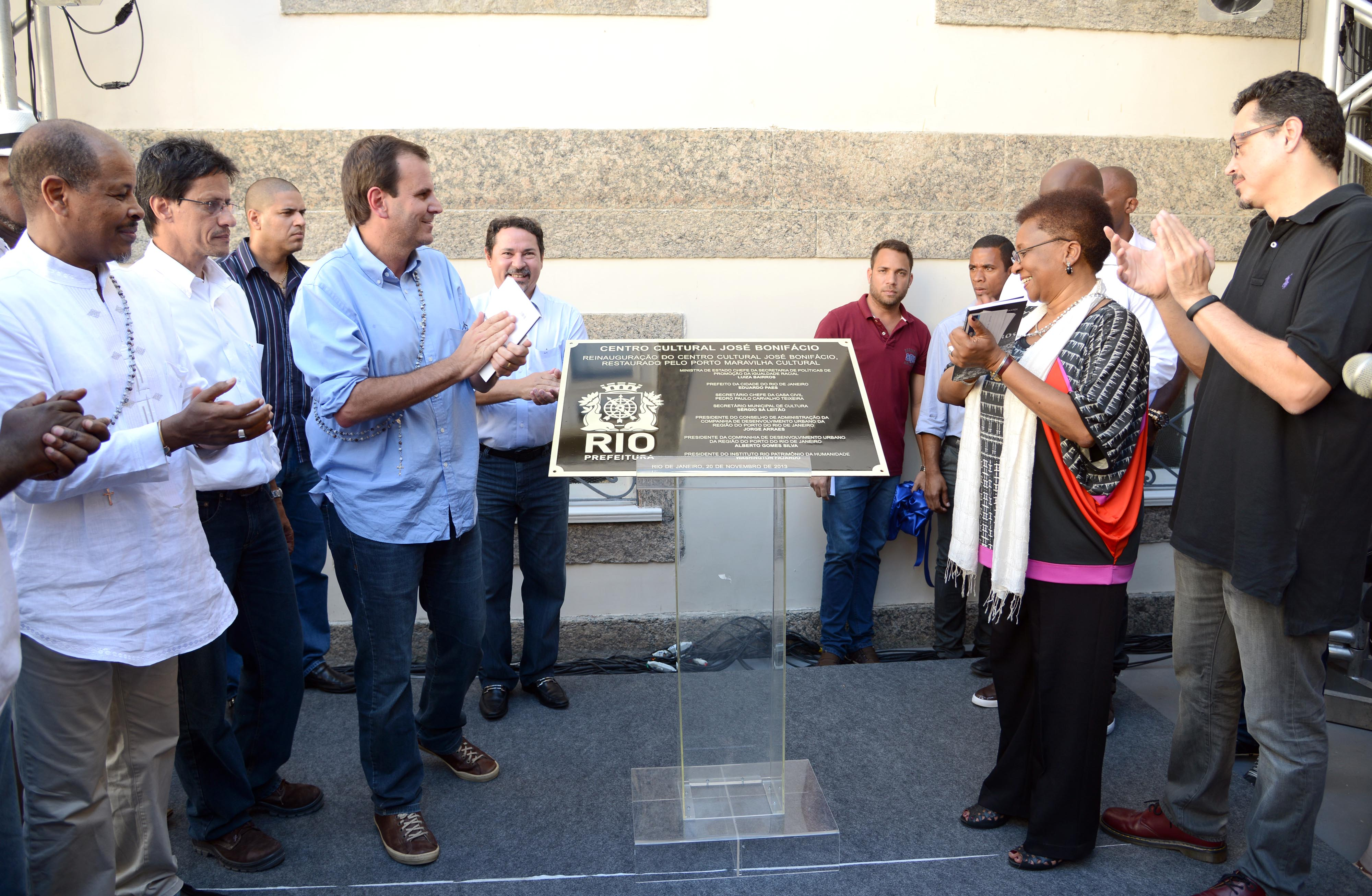 Reinauguração do Centro Cultural José Bonifácio, situado no bairro da Gamboa, na Zona Central da cidade do Rio de Janeiro.